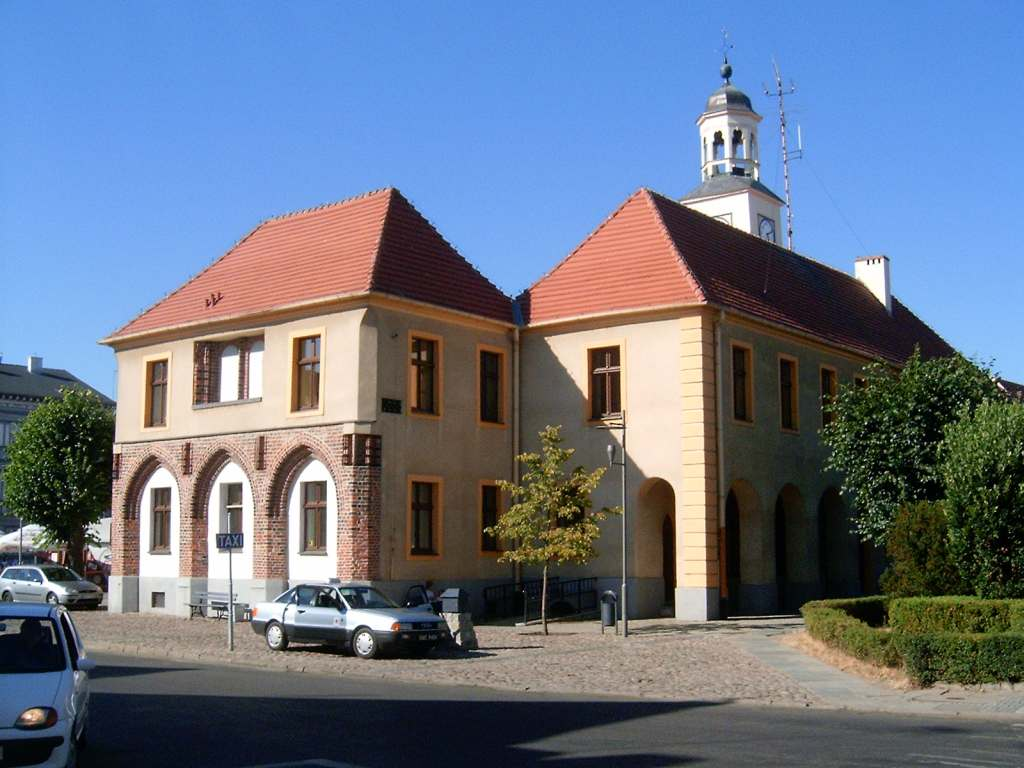 Trzebiatów - rynek